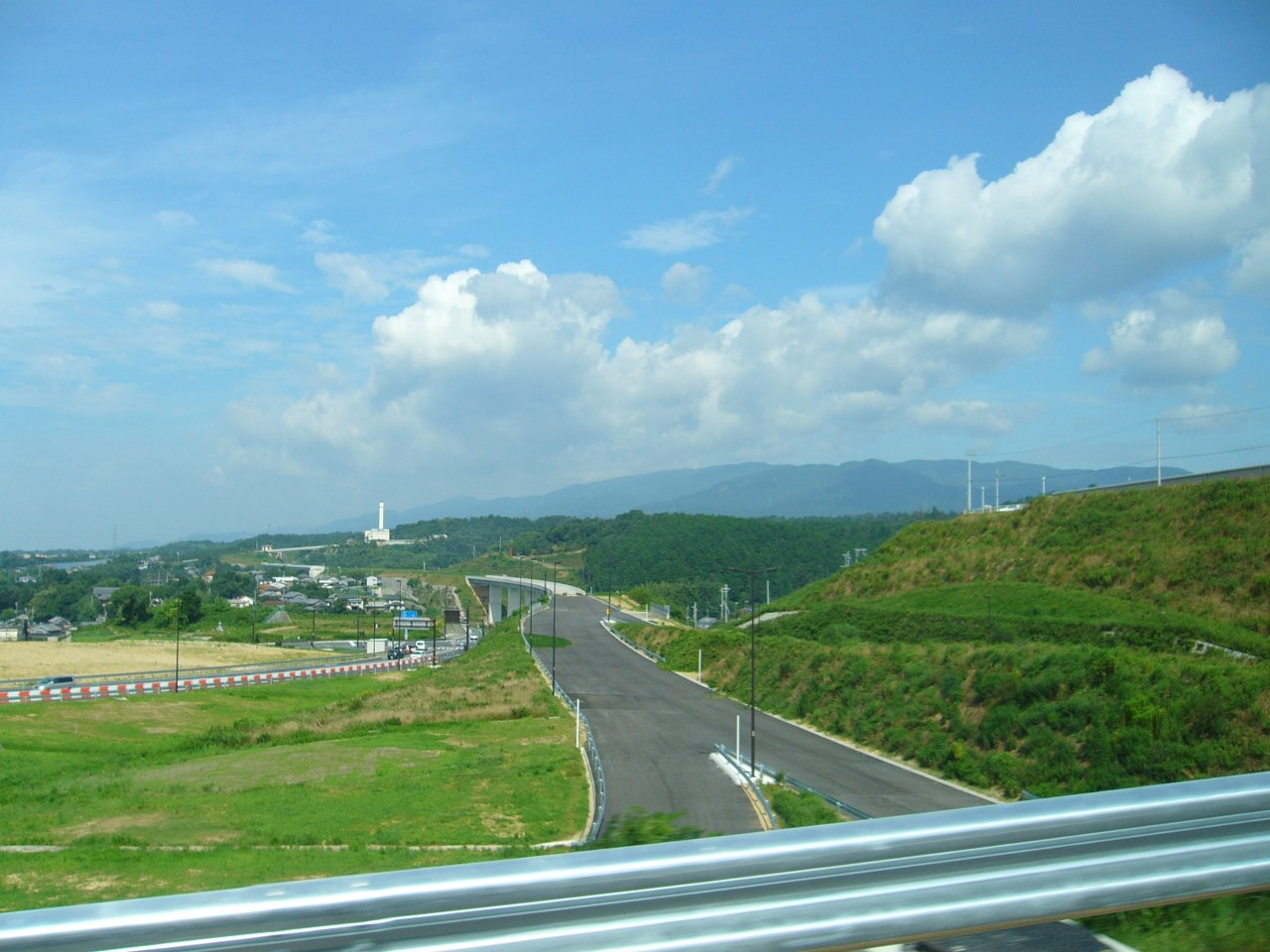 京奈和自動車道（橋本道路） 橋本東インターチェンジ 五條方面入口ランプウェイから、未開通の和歌山方面への道路を望む